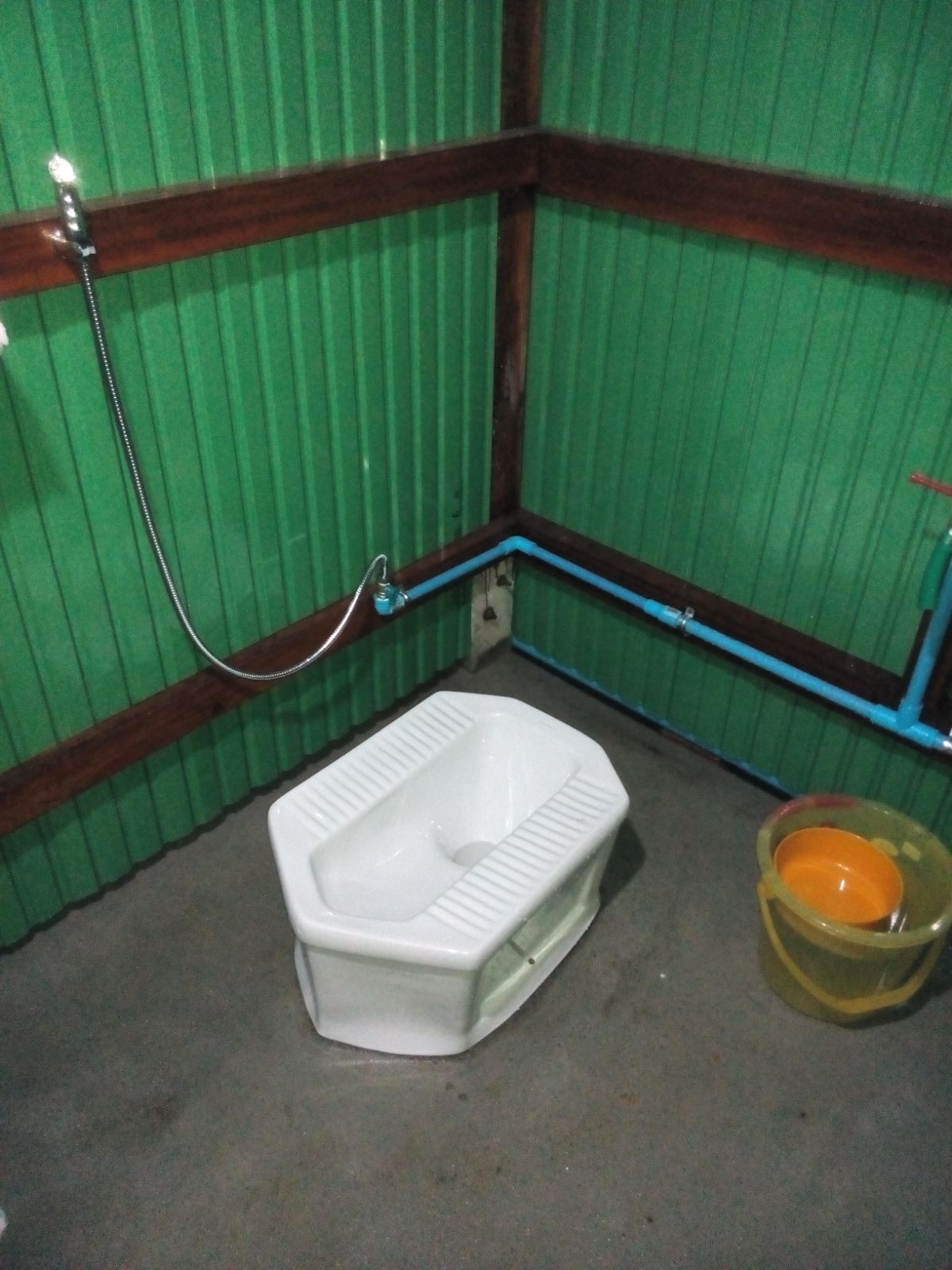 泰国上中厕所